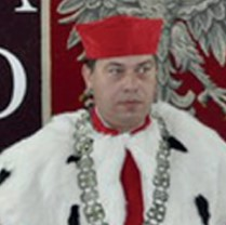 Rektor Powszechnej Wyższej Szkoły Humanistycznej "POMERANIA"